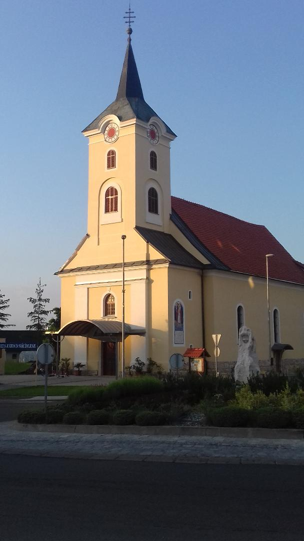 Cerkev sv. Bolfenka v Trnovski vasi, zgrajena je bila v 18. stoletju.